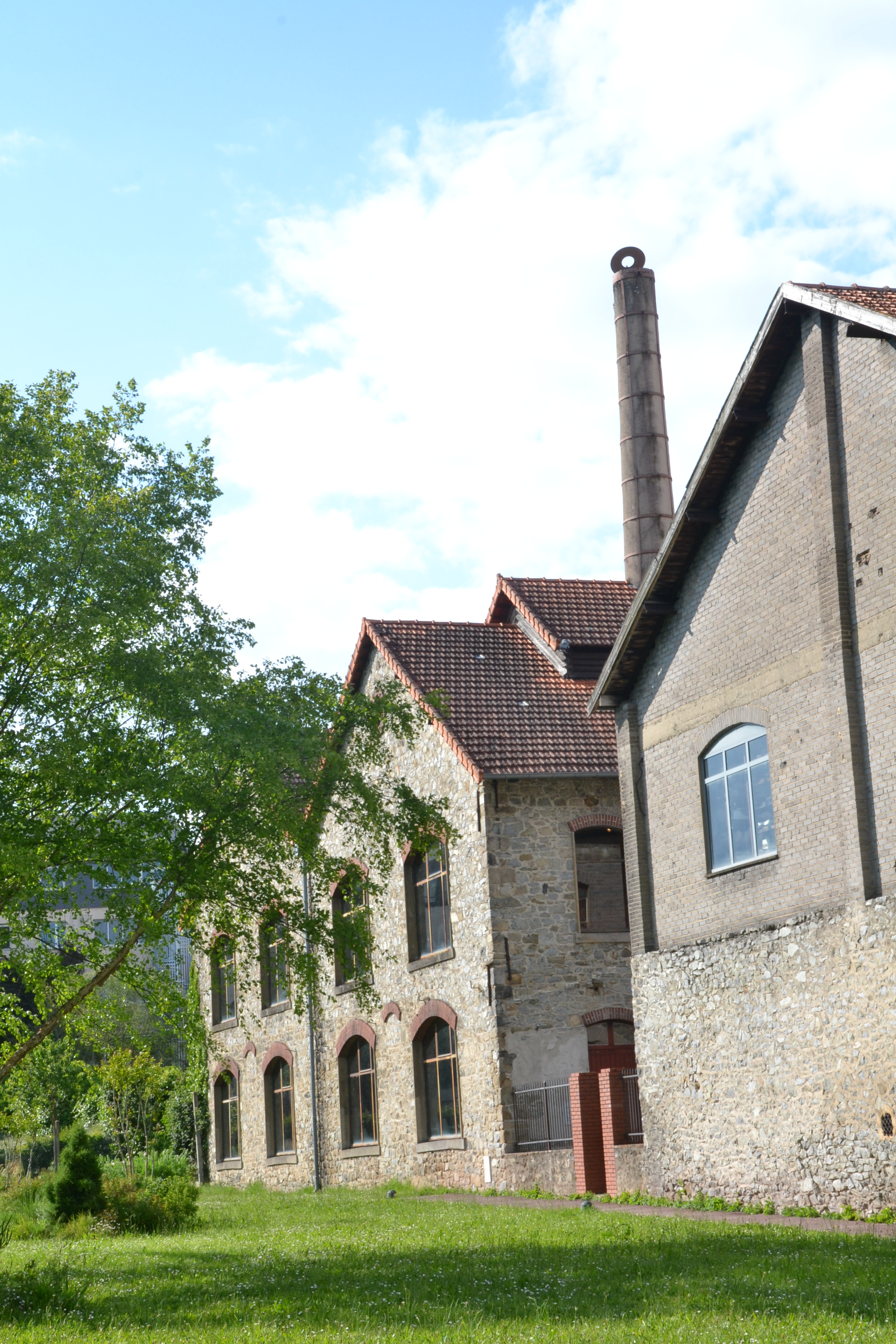 Bâtiments de l'usine de porcelaine Royal Limoges, abritant l'ancien four des Casseaux (Limoges, Haute-Vienne, France).